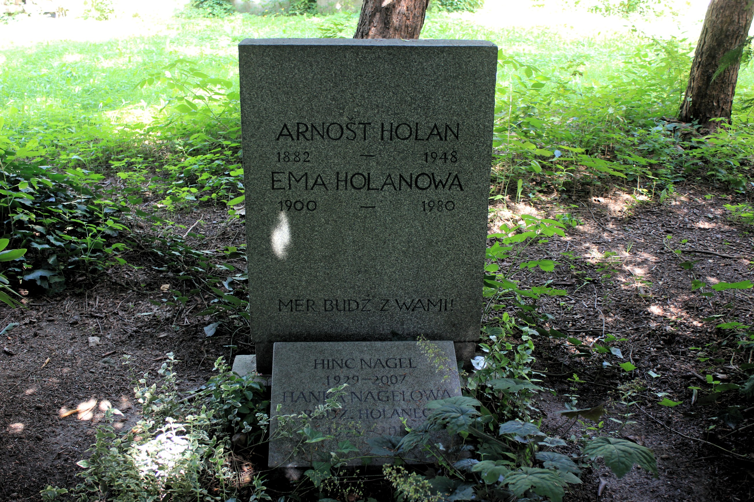 Hornjoserbsce: Row Arnošta Holana na Budyskim Tuchorskim pohrjebnišću.